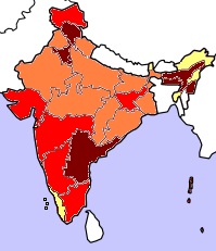 Kartan bygger på resultatet från valet till Lok Sabha april/maj 2004. Gult betyder att partiet lanserat en eller flera kandidater i delstaten, dock utan att vinna mandat. Orange betyder att partiet vunnit mandat från delstaten. Rött betyder att partiet vunnit minst 25% av mandaten från den delstaten och mörkrött 50% eller mer. Kartan tar inte hänsyn till avhopp, partifusioner och fyllnadsval under den ordinarie mandatperiodens gång. Gjord av Soman.